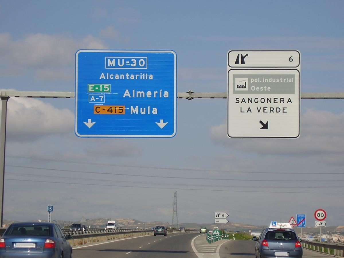 Imagen de la autovia MU-30 en Murcia, España